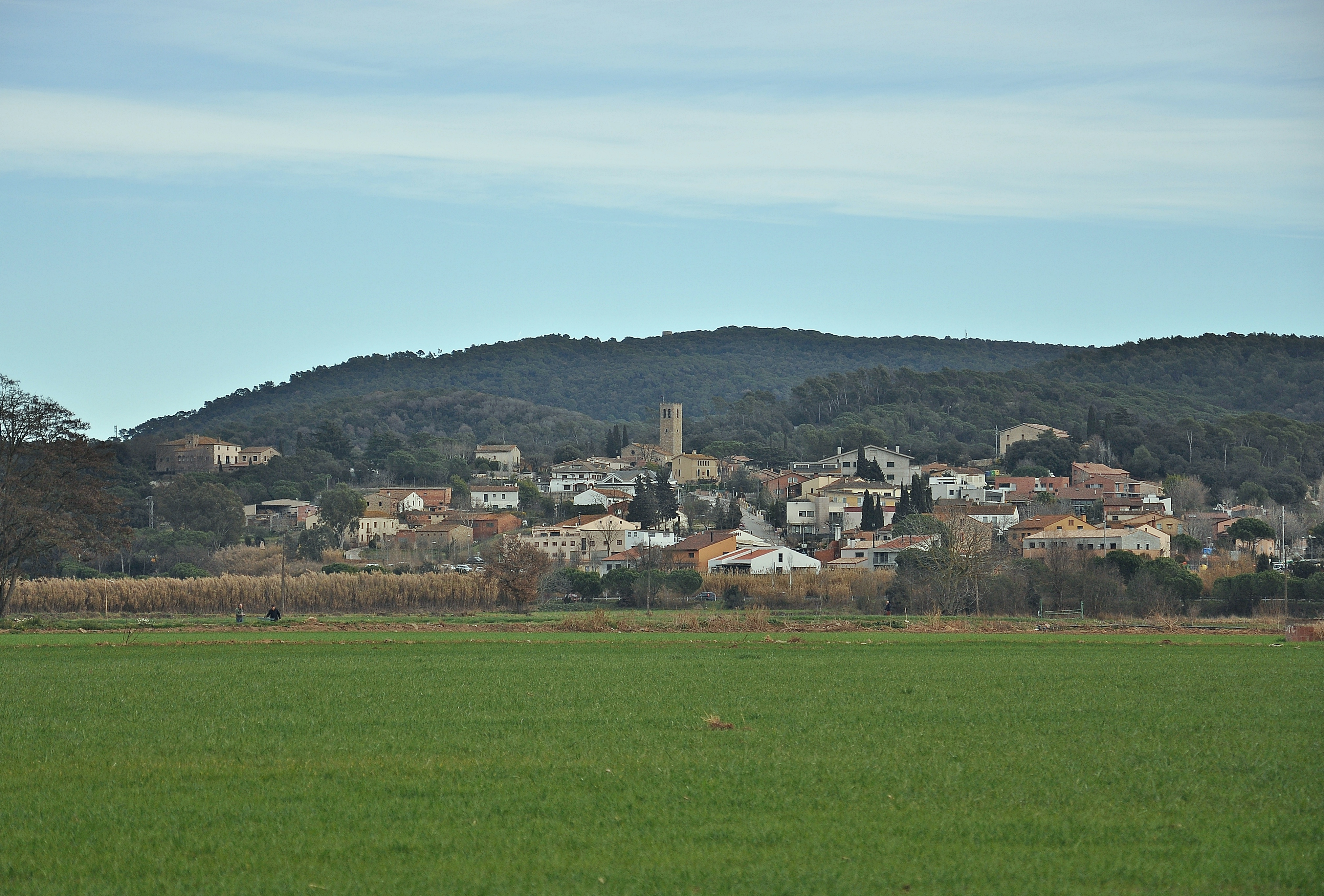 La Roca del Vallès-2018